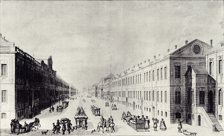 Махаев М.И. Вид Большой Немецкой (или Миллионной) улицы от Главной аптеки к Зимнему дворцу. 1751. Тушь, перо, кисть